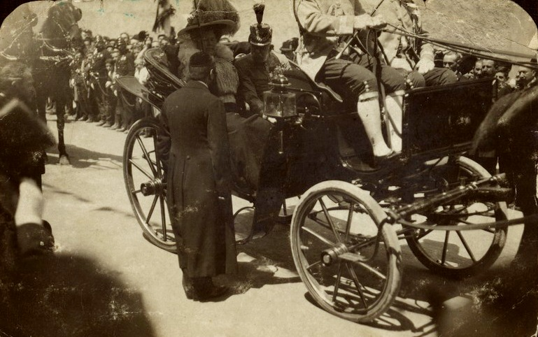 הדפס כסף מתצלום שחור לבן שבו נראה הרב הראשי ליהודי פרשבורג (ברטיסלבה), הרב עקיבא סופר (בגבו למצלמה) מקדם בברכה את הקיסר פרנץ יוזף ורעייתו סיסי (יושבים במרכבה), בעת ביקורם הרשמי בעיר, בשנת 1913. ברקע נראה ההמון אשר קידם בברכה את הקיסר והקיסרית עם בואם לברטיסלבה. תצלום זה נמצא בתוך "אוצרות הגולה" אשר הובאו לספרייה הלאומית על ידי שלמה שונמי לאחר מלחמת העולם השניה.